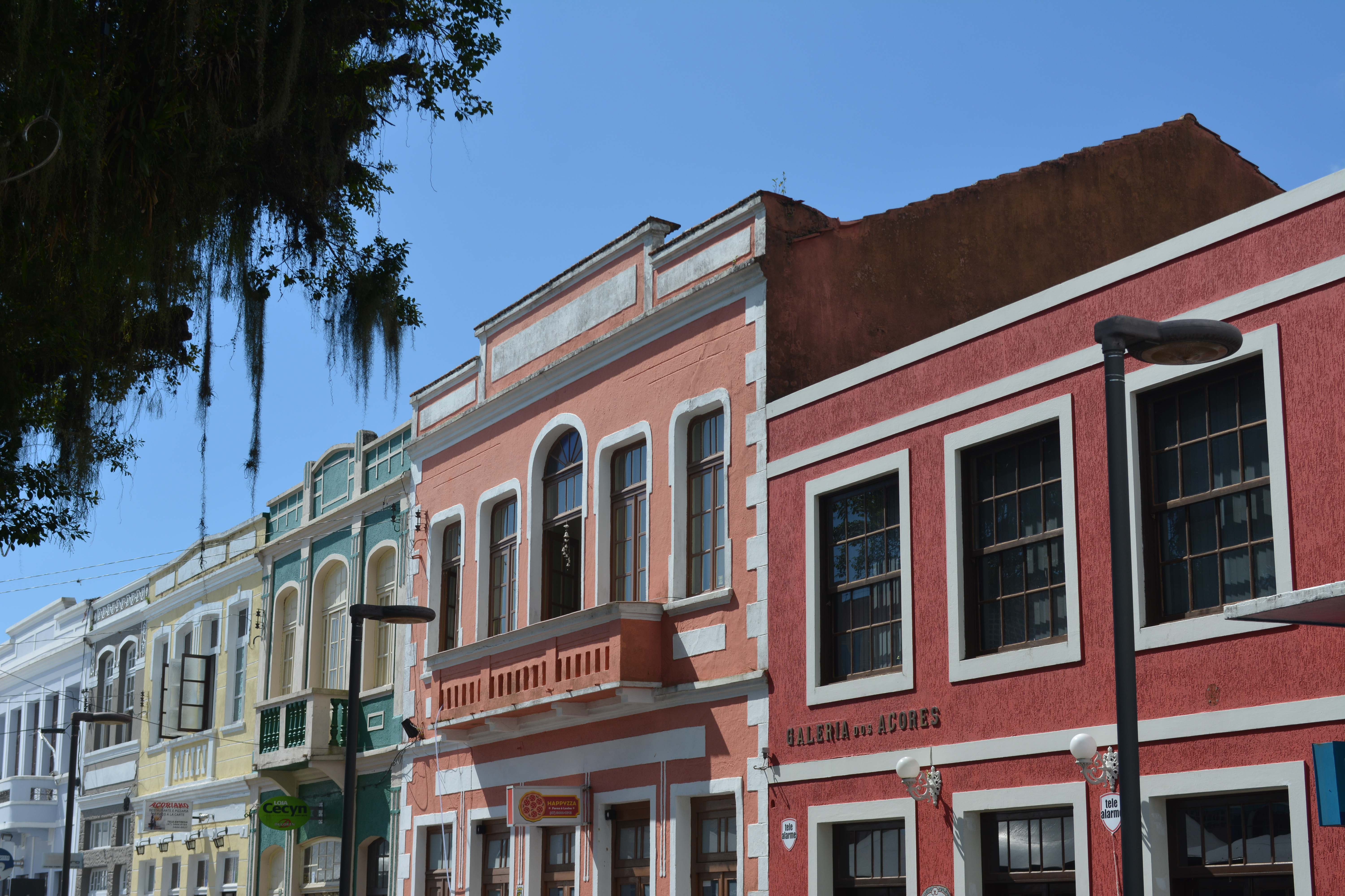 São Francisco do Sul, SC: centro histórico e paisagístico